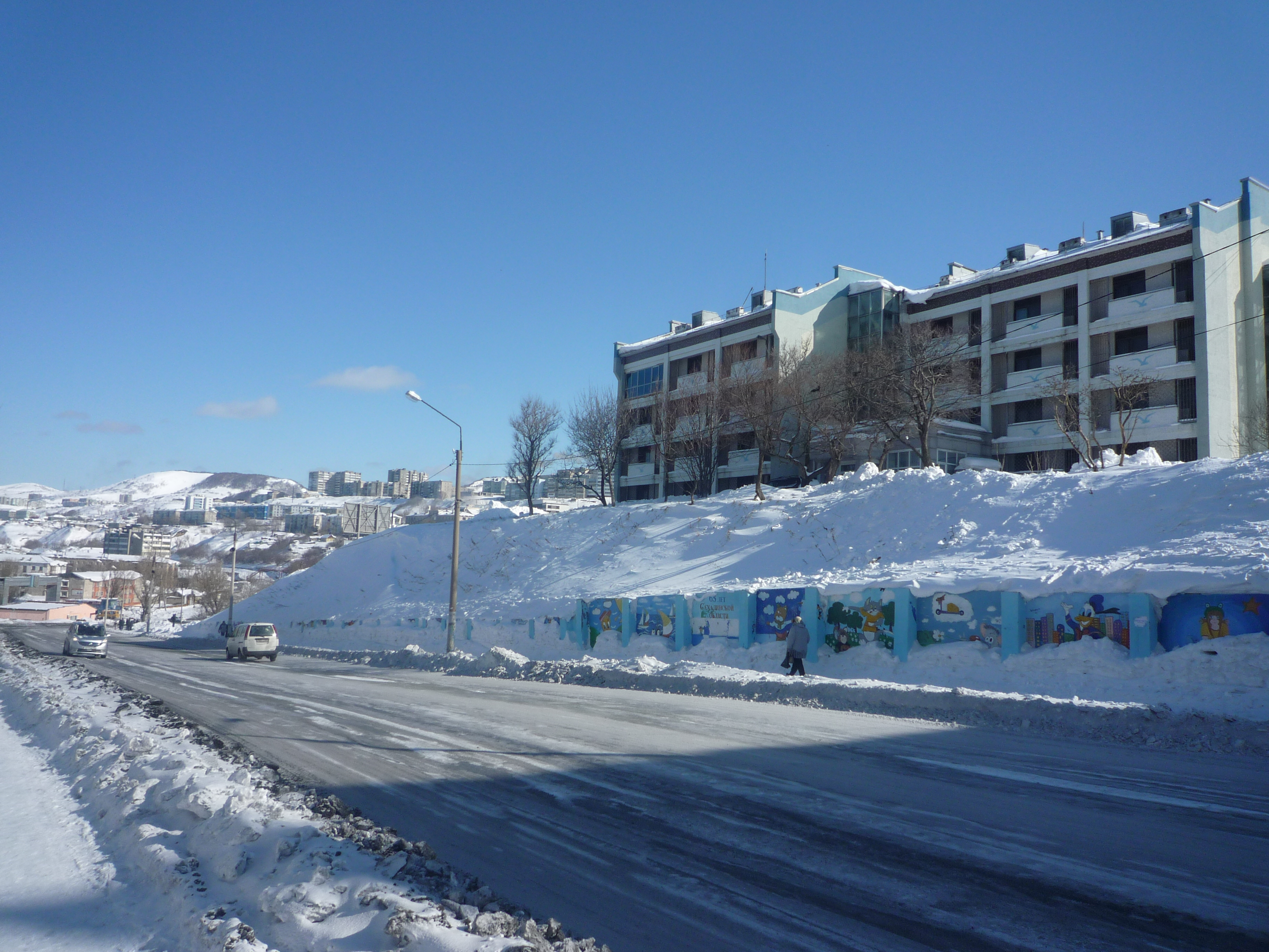 Зимний Холмск